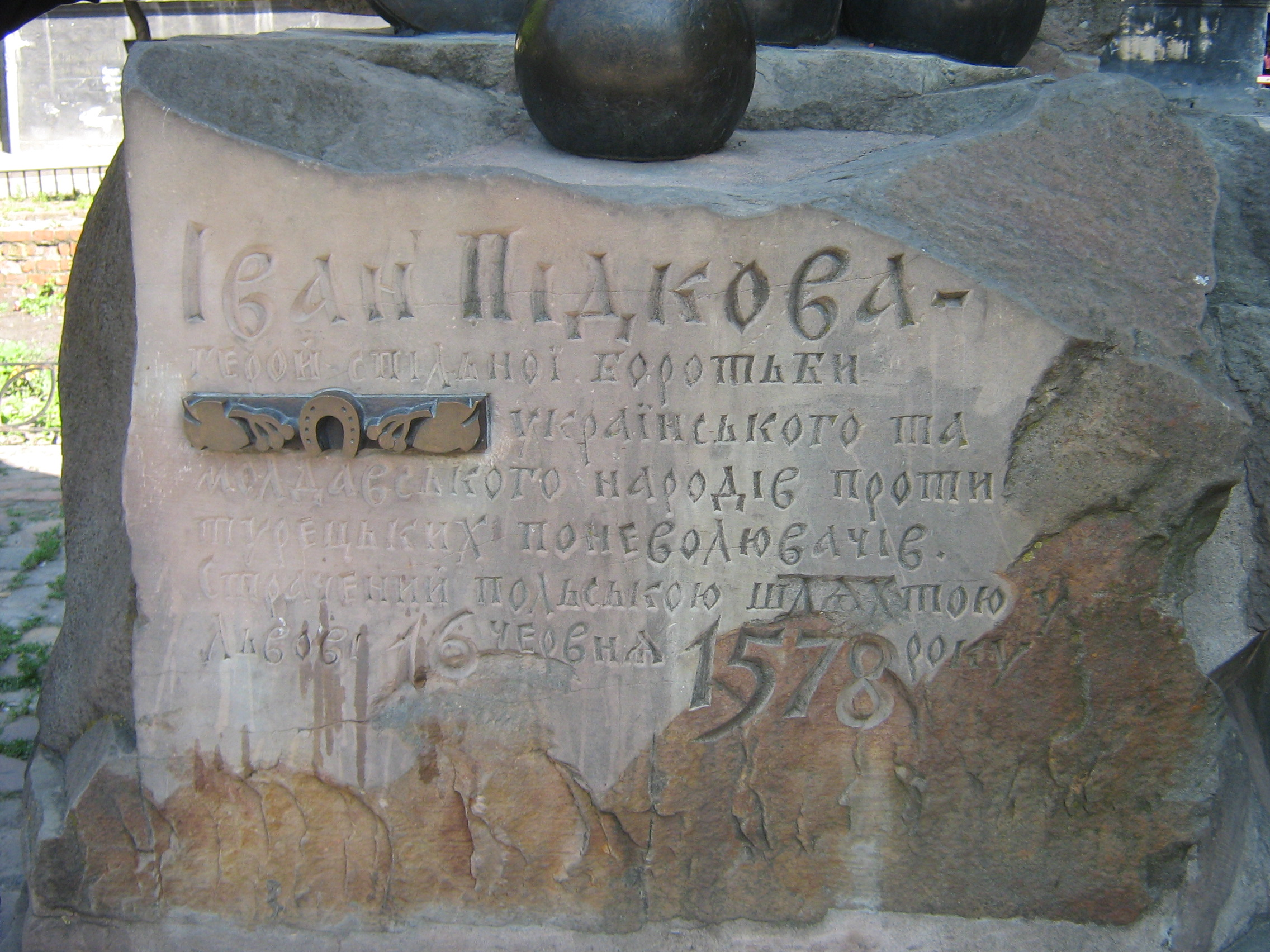 П'єдестал пам'ятнику Івану Підкові у Львові.